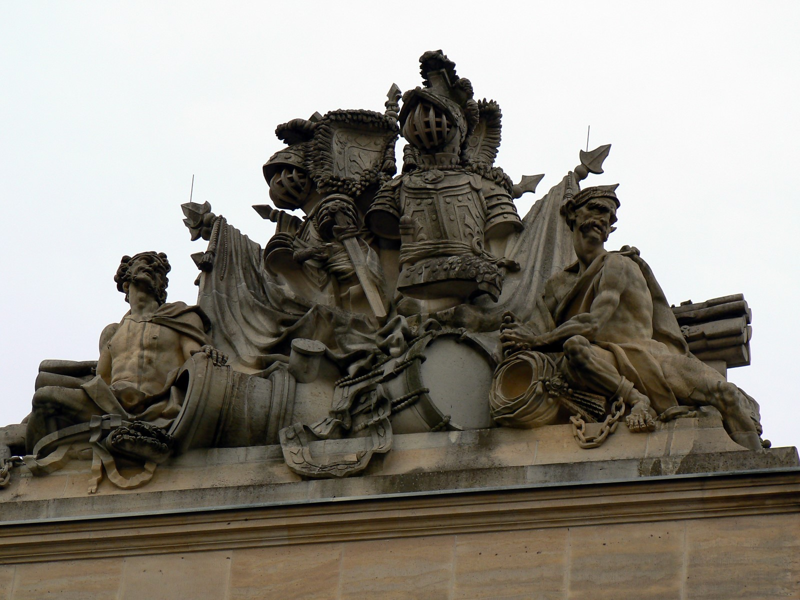 Detailaufnahme der Skulpturen am Zeughaus (Westseite).